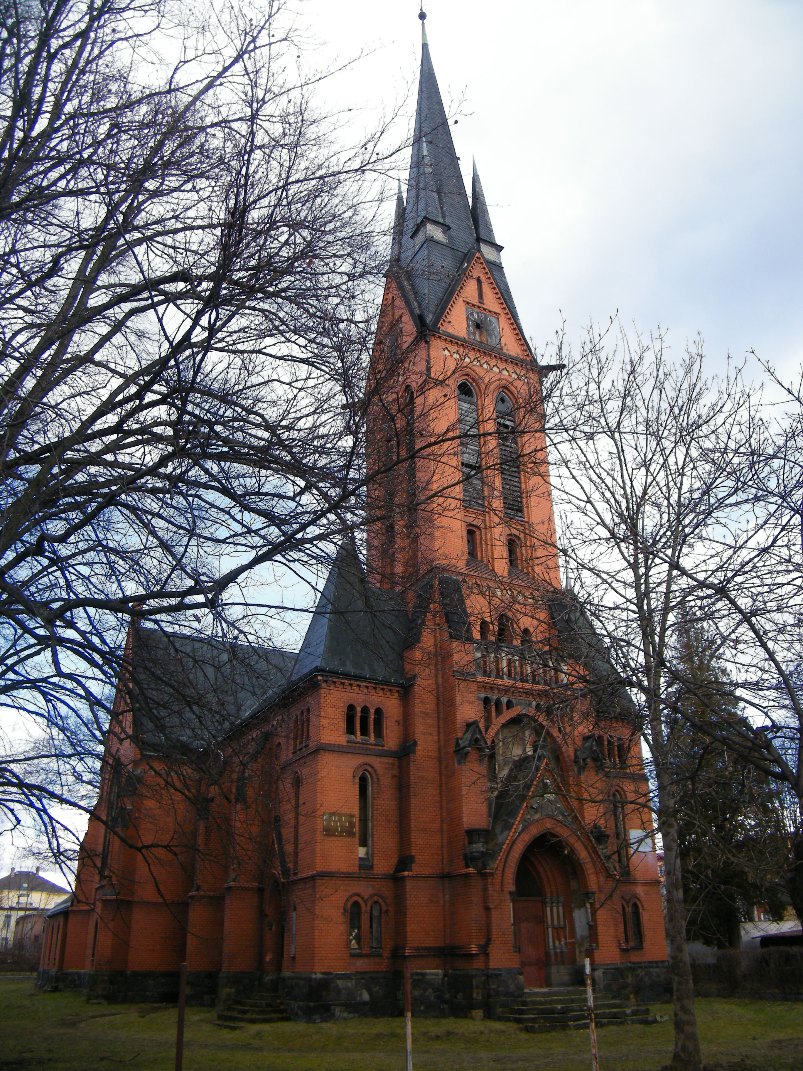 Červený kostel ve Varnsdorfu